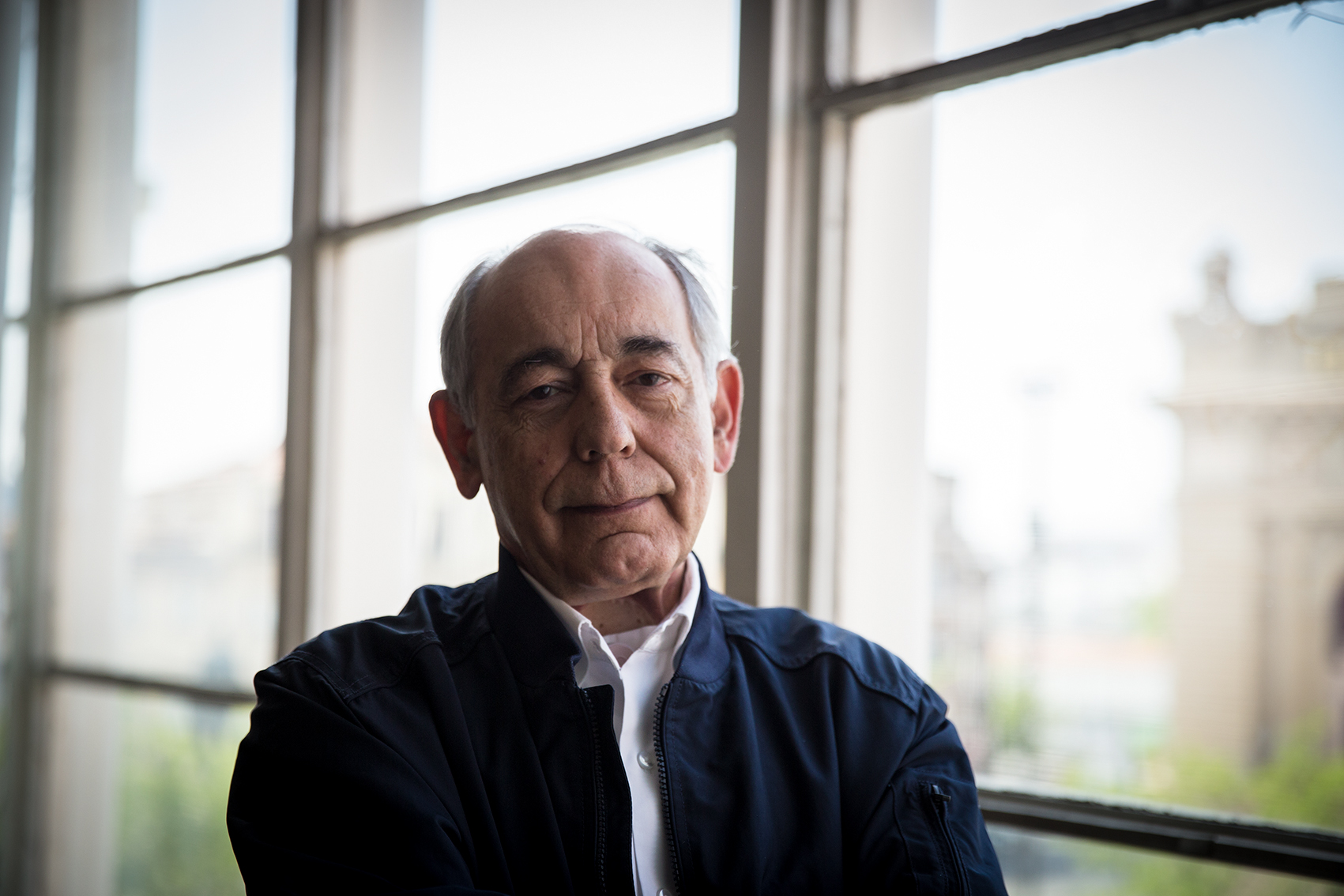 Candidato do Bloco de Esquerda à CM do Porto